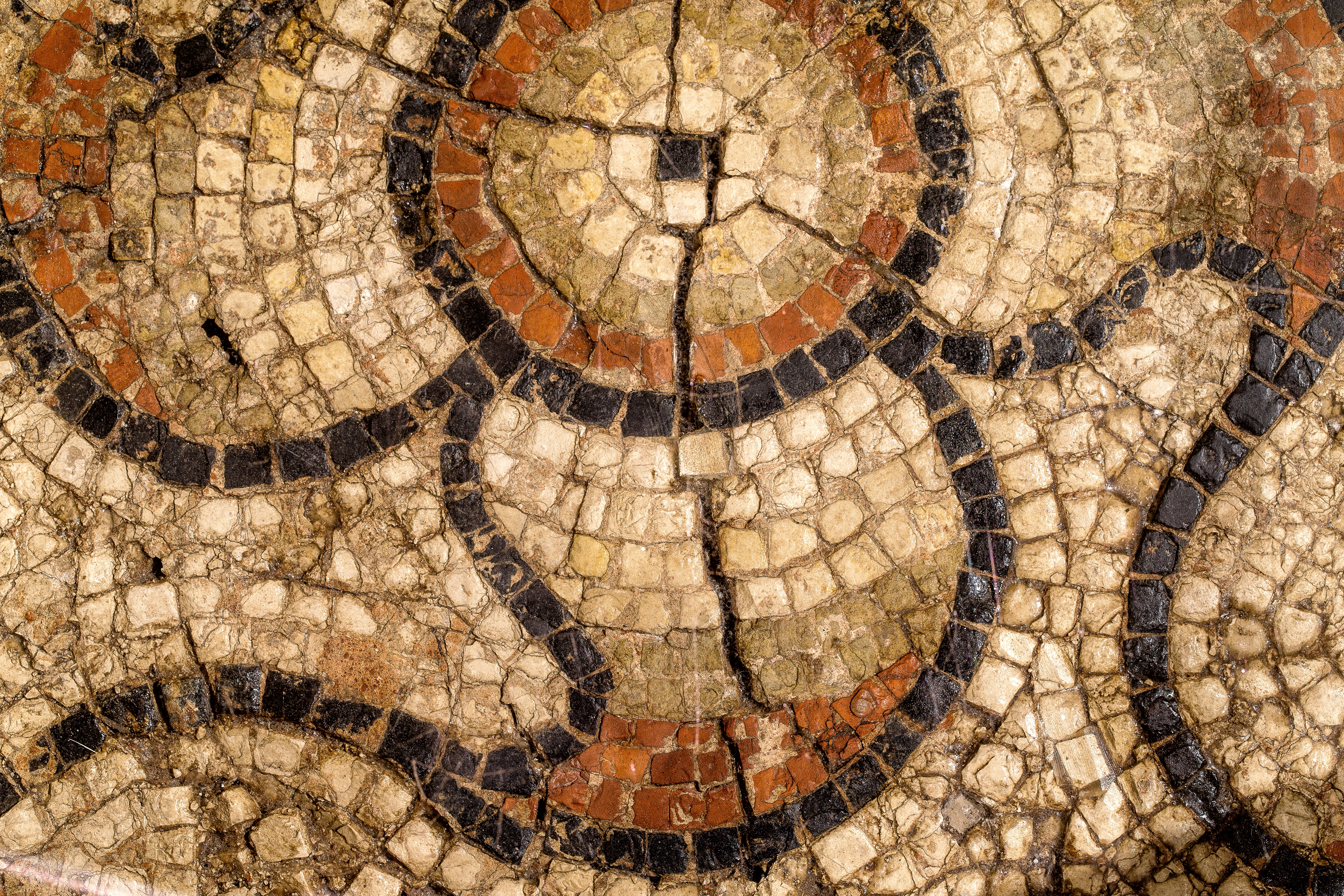 Fragmentaire geometrische vloermozaiek in kalksteen en terra sigillata, afgeboord met opus spictatum in terracotta, 70 tot 175 NC, vindplaats Tongeren, Hondsstraat, 1989-1990, collectie Gallo-Romeins Museum Tongeren, GRM 2848